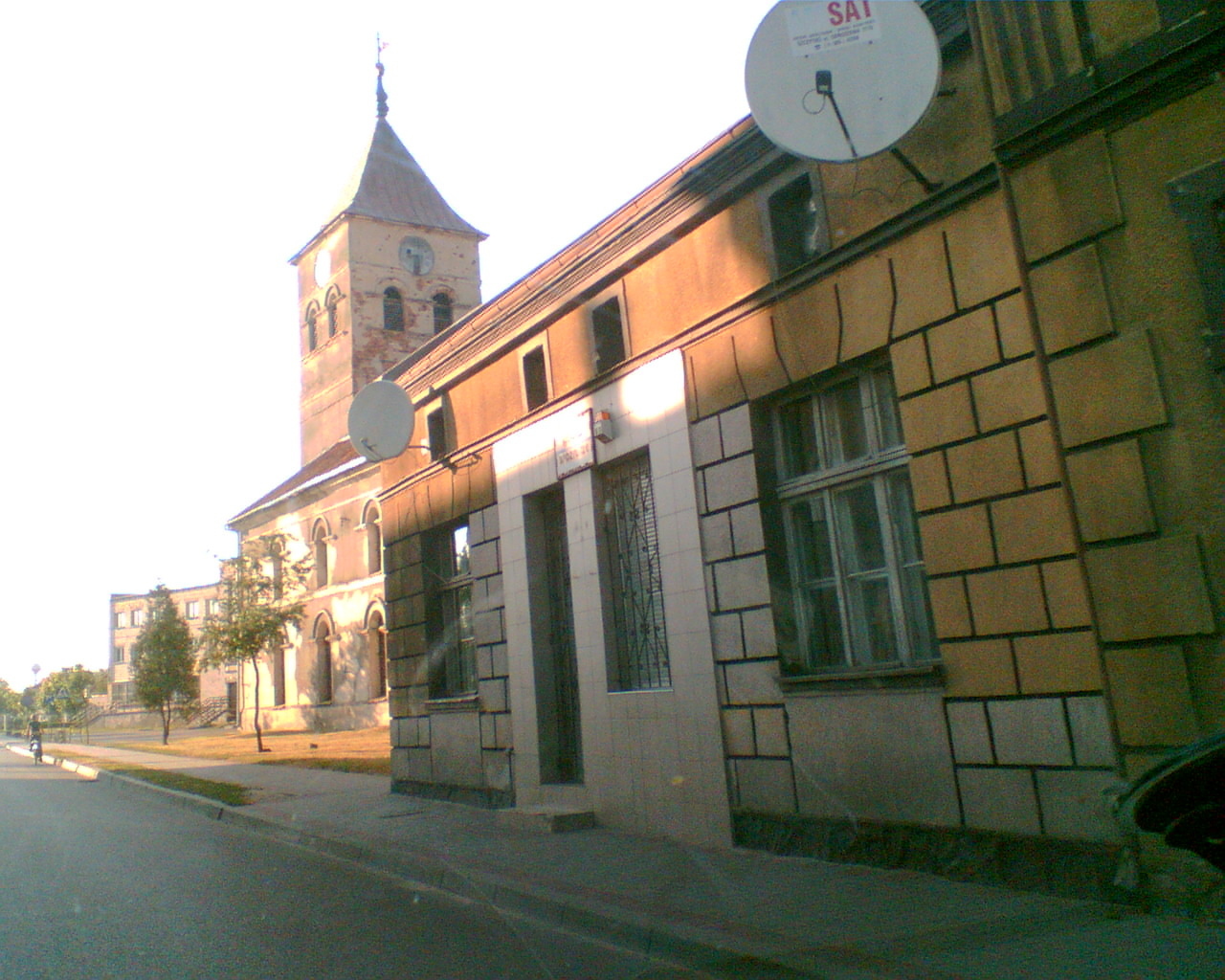 Ulica w Wielbarku, widoczna wieża ewangelickiej świątyni